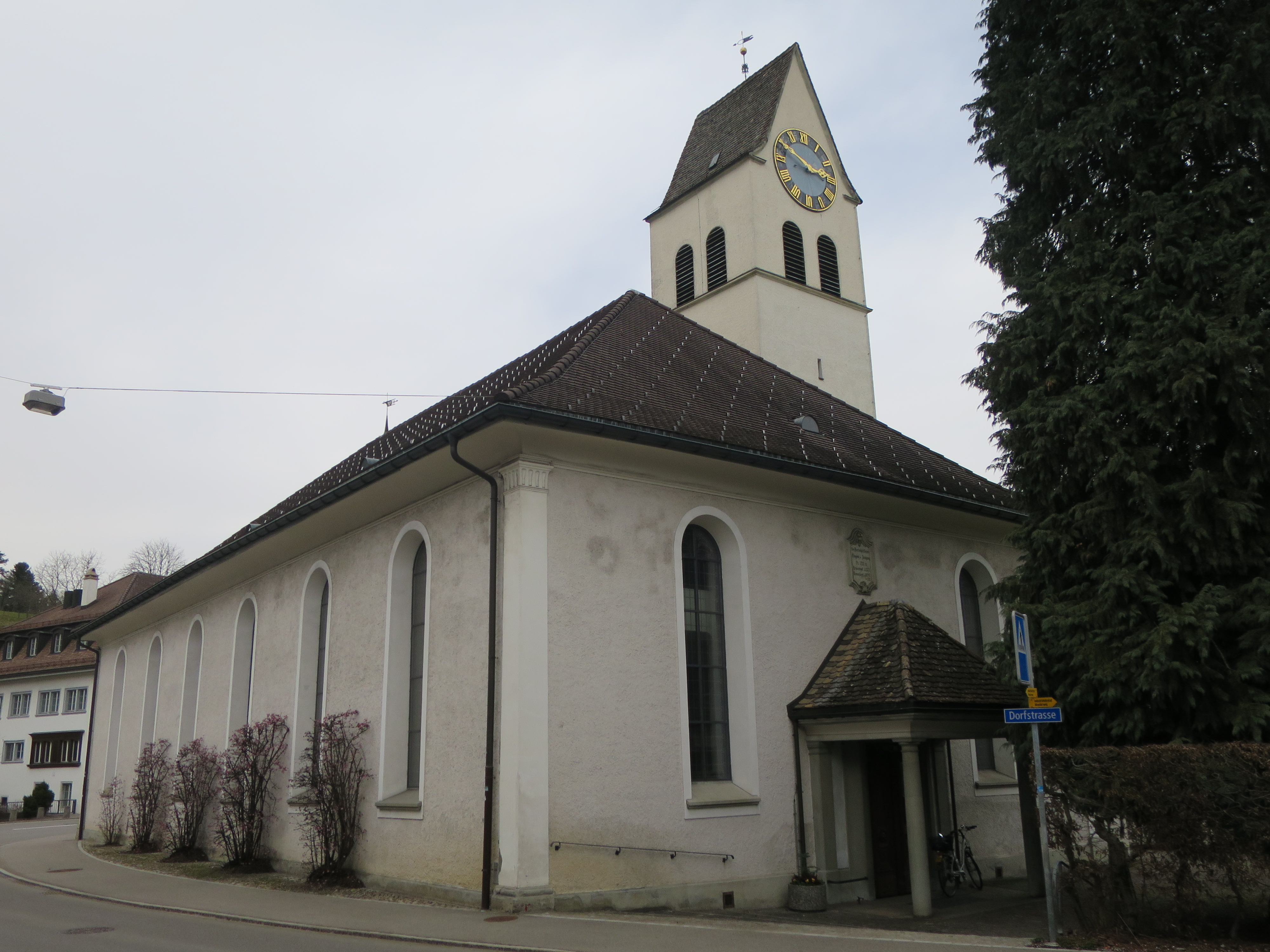 Reformierte Kirche Bauma aussen